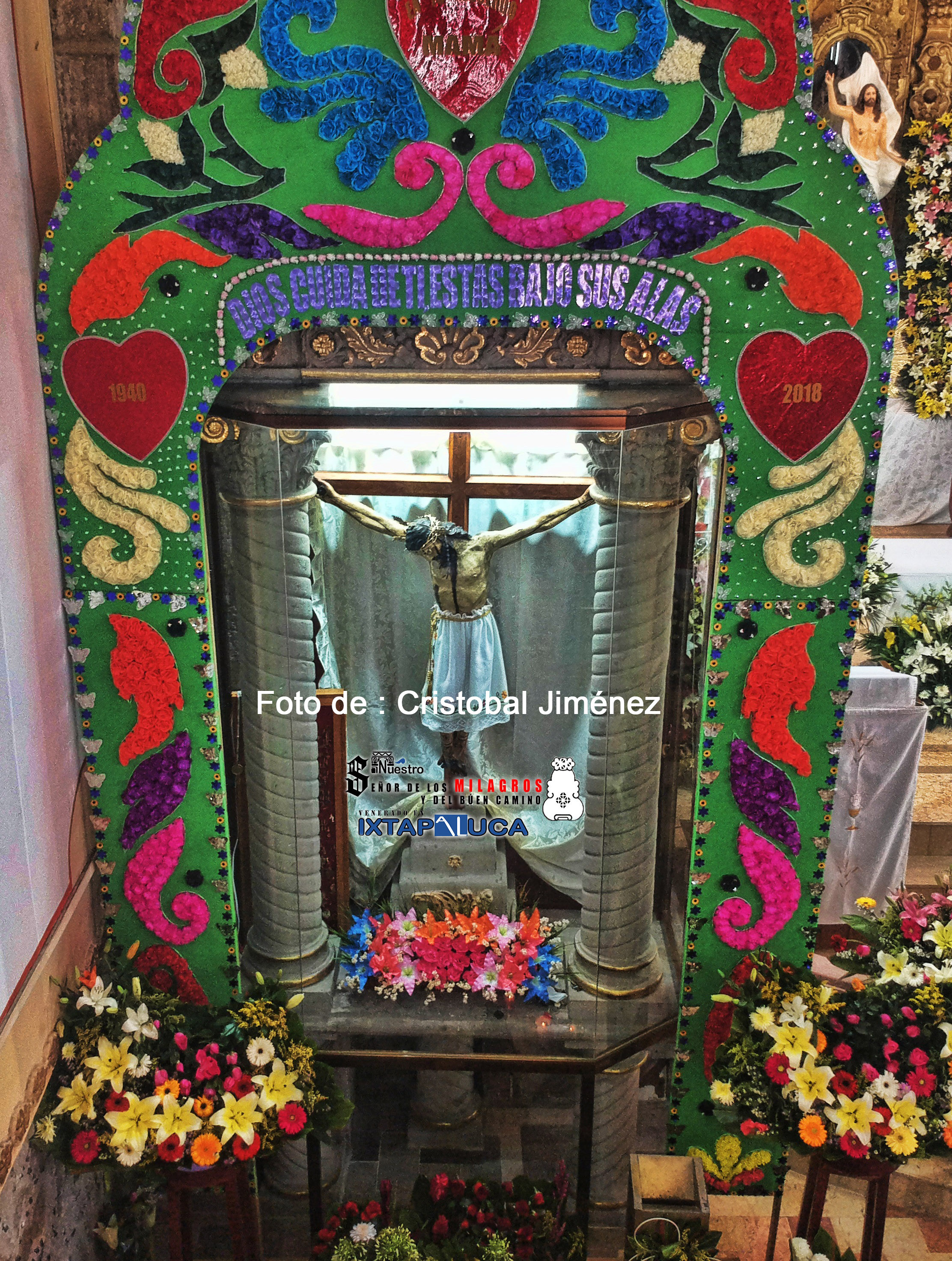 Imagen del Señor de los MIlagros Ixtapaluca 2018 This image contains digital watermarking or credits in the image itself. The usage of visible watermarks is discouraged. If a non-watermarked version of the image is available, please upload it under the same file name and then remove this template. Ensure that removed information is present in the image description page and replace this template with metadata from image or attribution metadata from licensed image . Caution: Before removing a watermark from a copyrighted image, please read the WMF's analysis of the legal ramifications of doing so, as well as Commons' proposed policy regarding watermarks. If the old version is still useful, for example if removing the watermark damages the image significantly, upload the new version under a different title so that both can be used. After uploading the non-watermarked version, replace this template with superseded|new filename|version without watermarks .